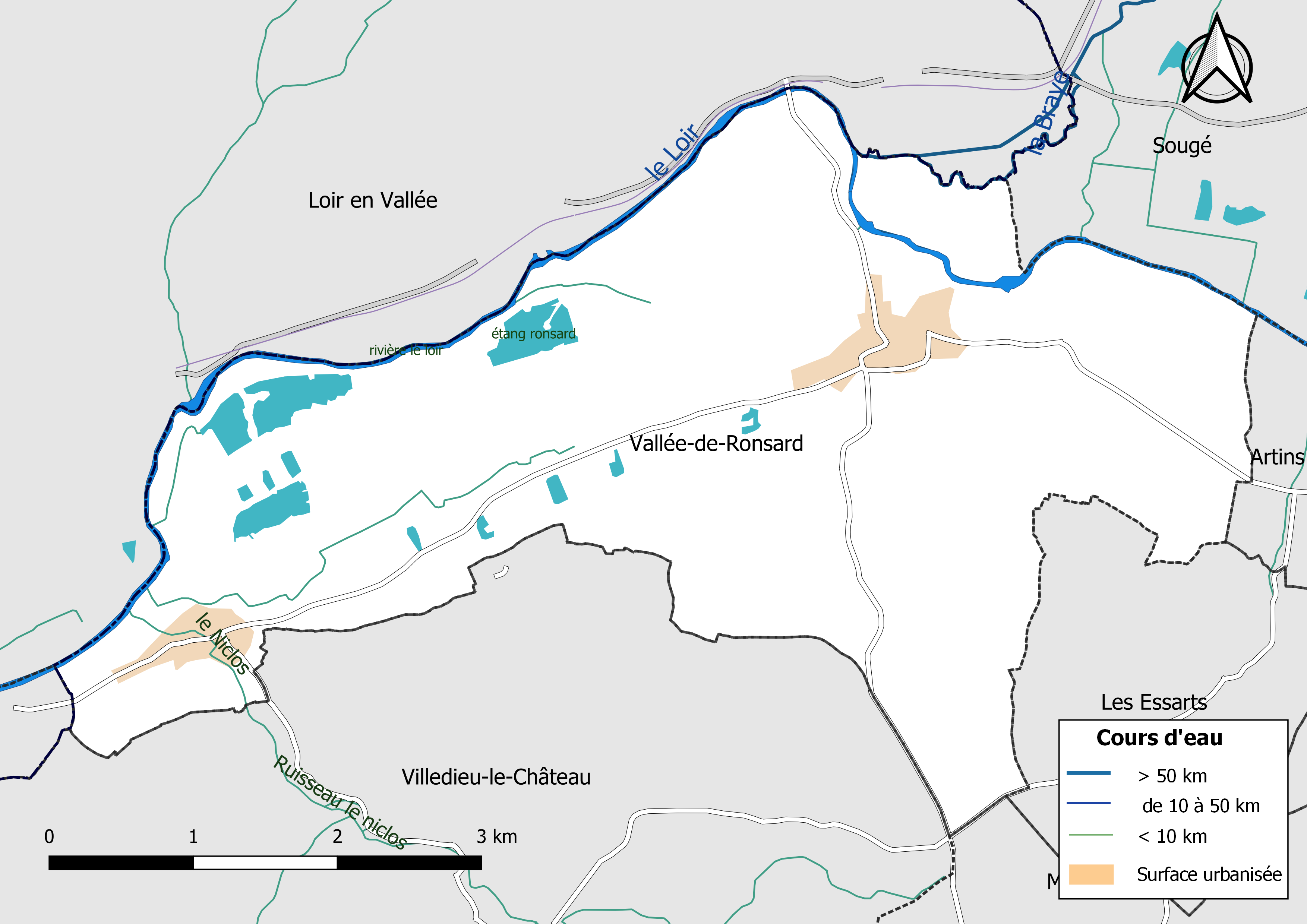 Carte du réseau hydrographique de la commune de Vallée-de-Ronsard (Loir-et-Cher, France).